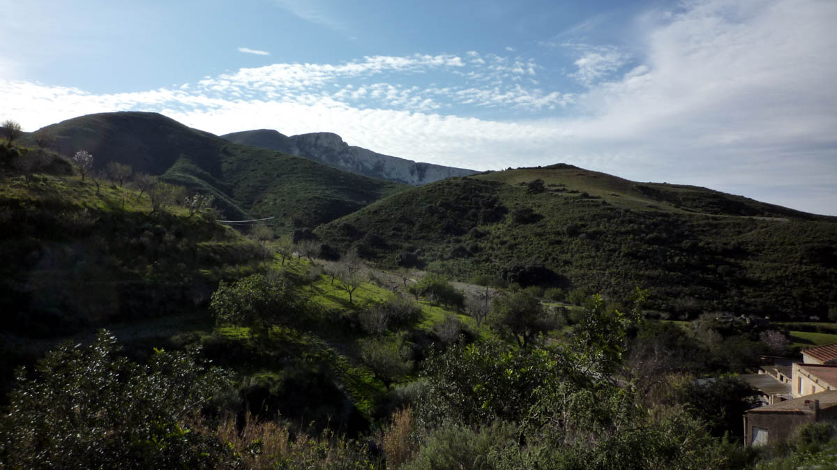 Vista de Peñas Blancas desde el Rincón de Sumiedo. Parque Natural de la Sierra de la Muela, Cabo Tiñoso y Roldán en Cartagena (España)